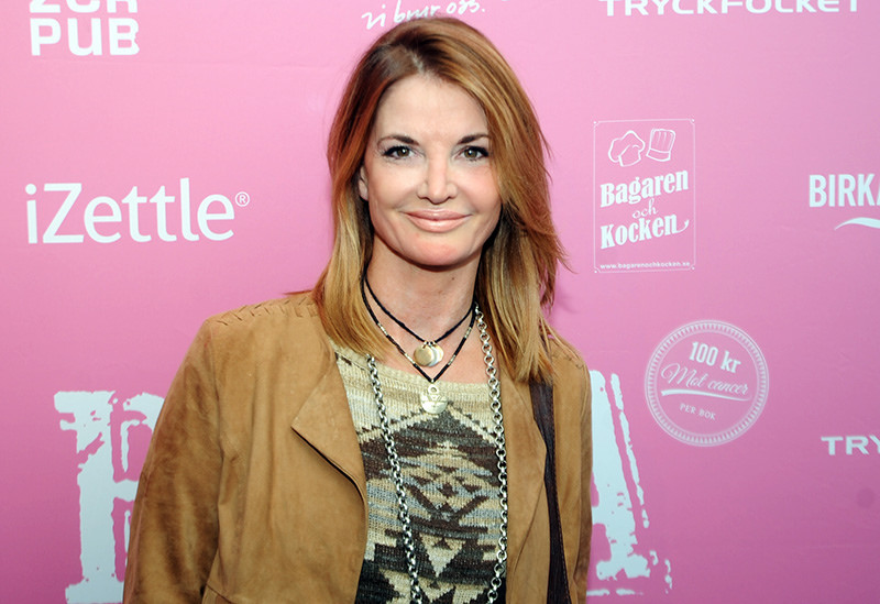 Lulu Carter